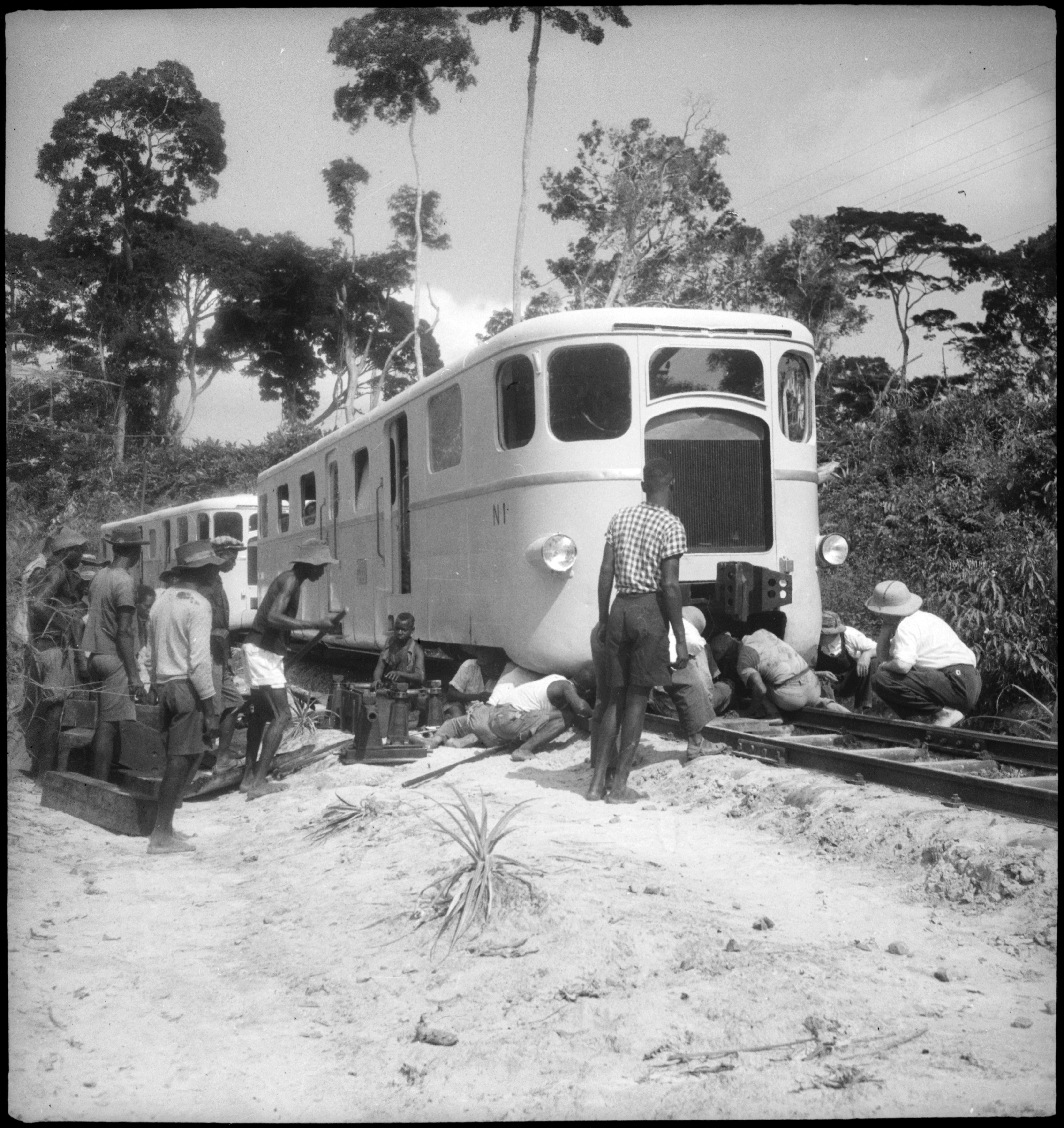 Belgisch-Kongo, Thysville (Mbanza Ngungu): Eisenbahn; Zwei Züge bestehend aus je einem Wagen stehen hintereinander auf den Geleisen; mehrere Personen befinden sich neben oder unter dem Zug am Reparieren